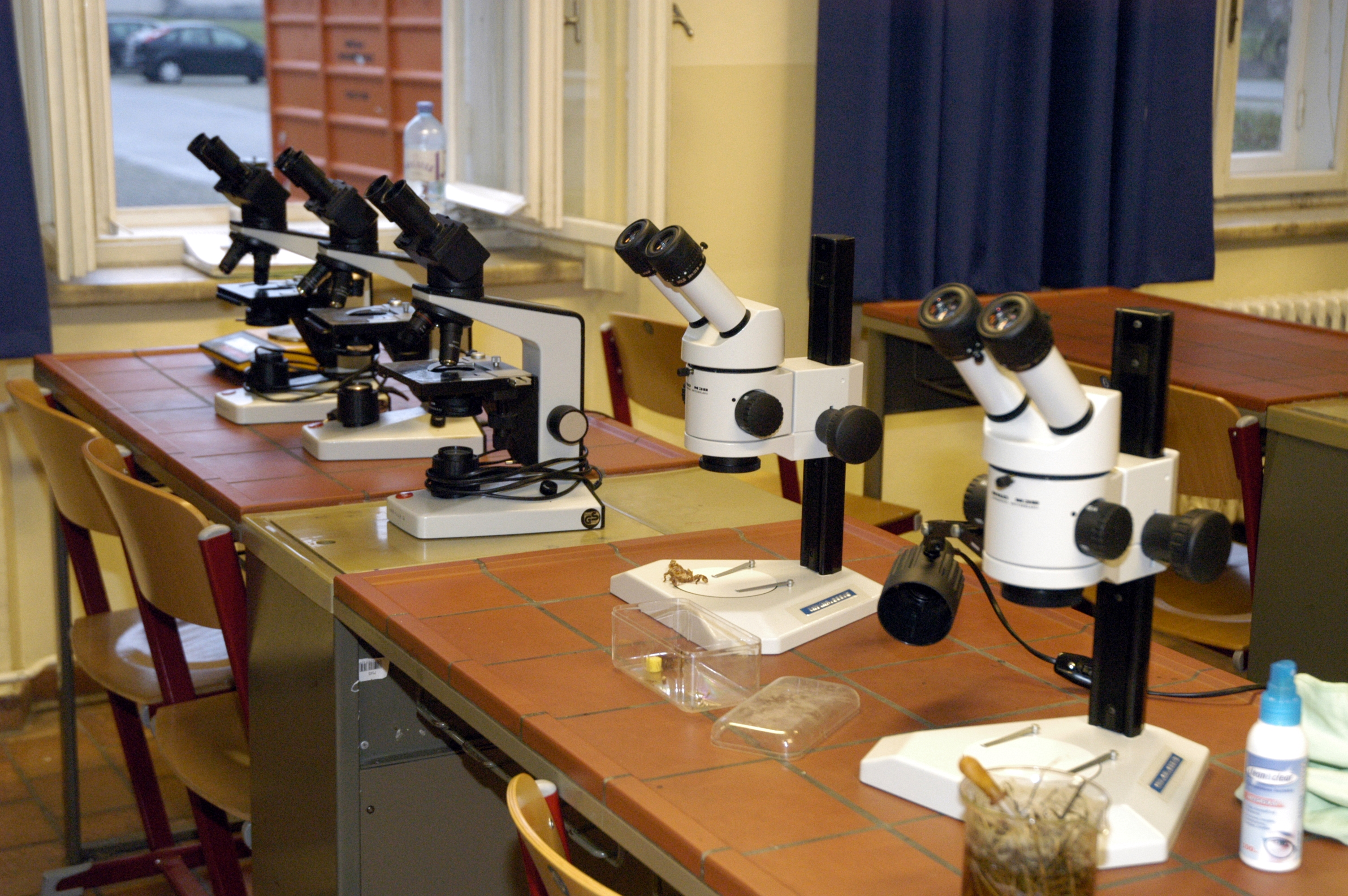 Wissenschaftliche Ausbildung am Militärrealgymnasium Wiener Neustadt